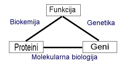 Tri podruÄ ja koja s molekularnom biologijom Ä ine zatvoreni trokut.